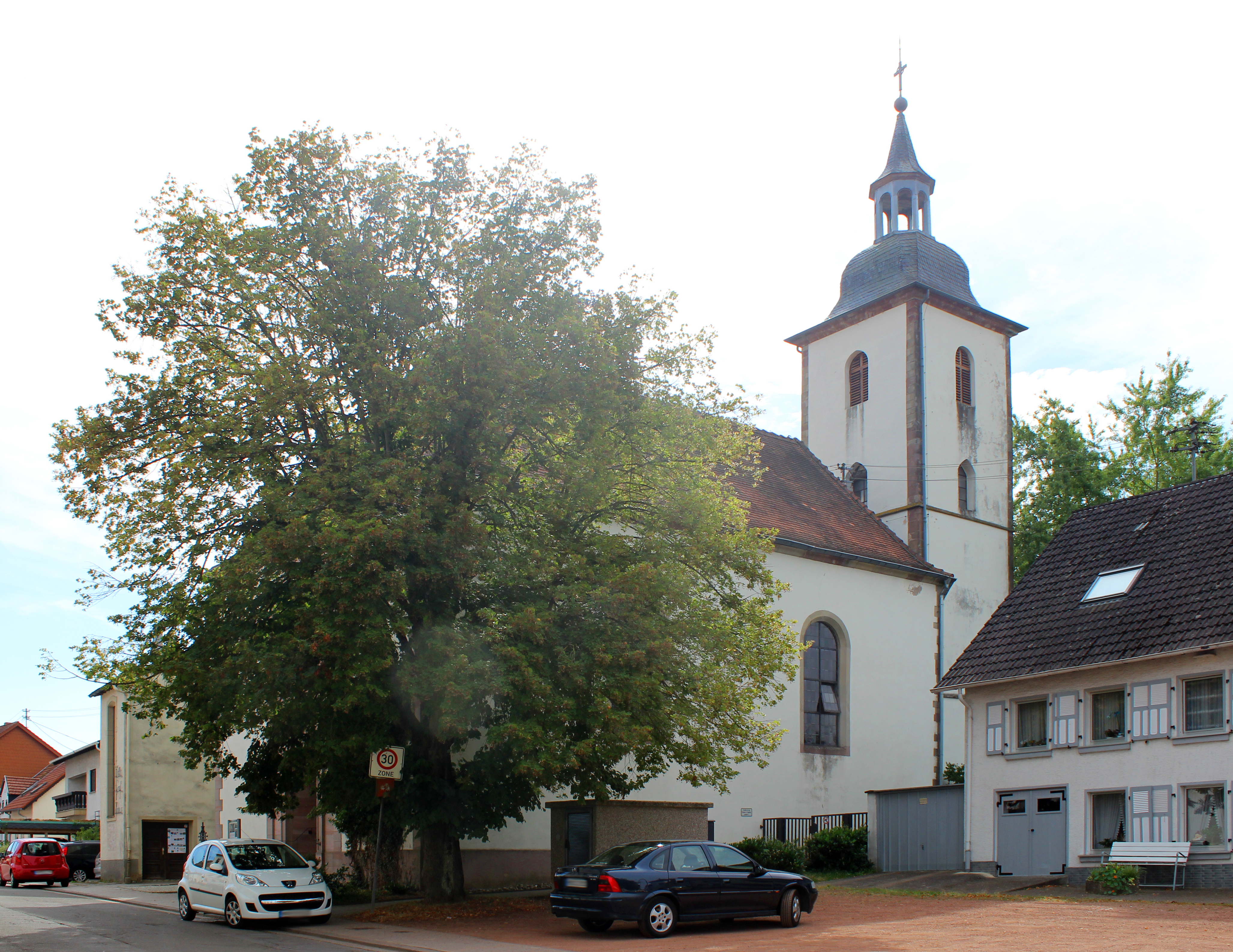 Ehemalige Kirche St. Petrus in Ketten, Bliesmengen-Bolchen, Gemeinde Mandelbachtal, Saarpfalz-Kreis, Saarland